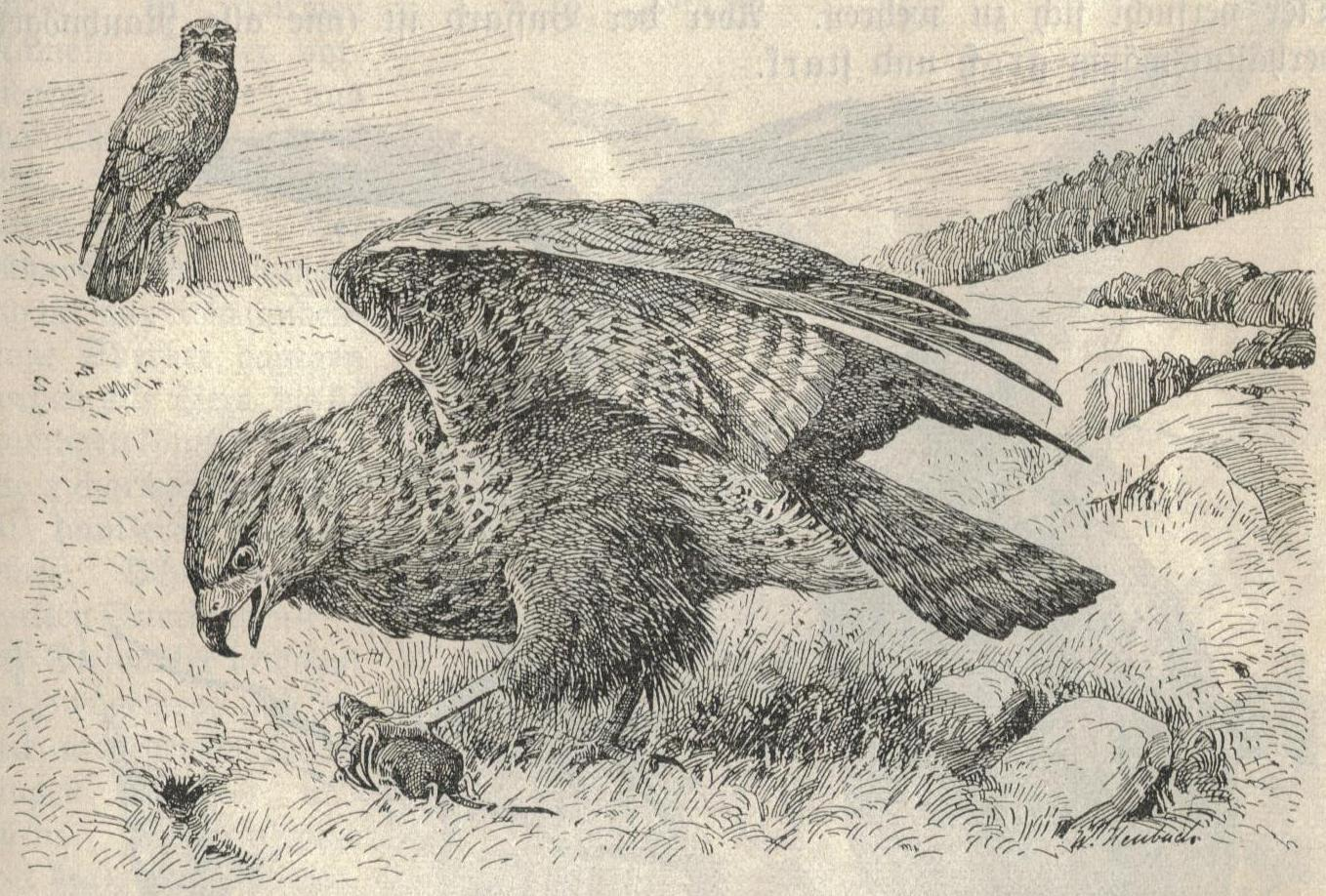 Common buzzard